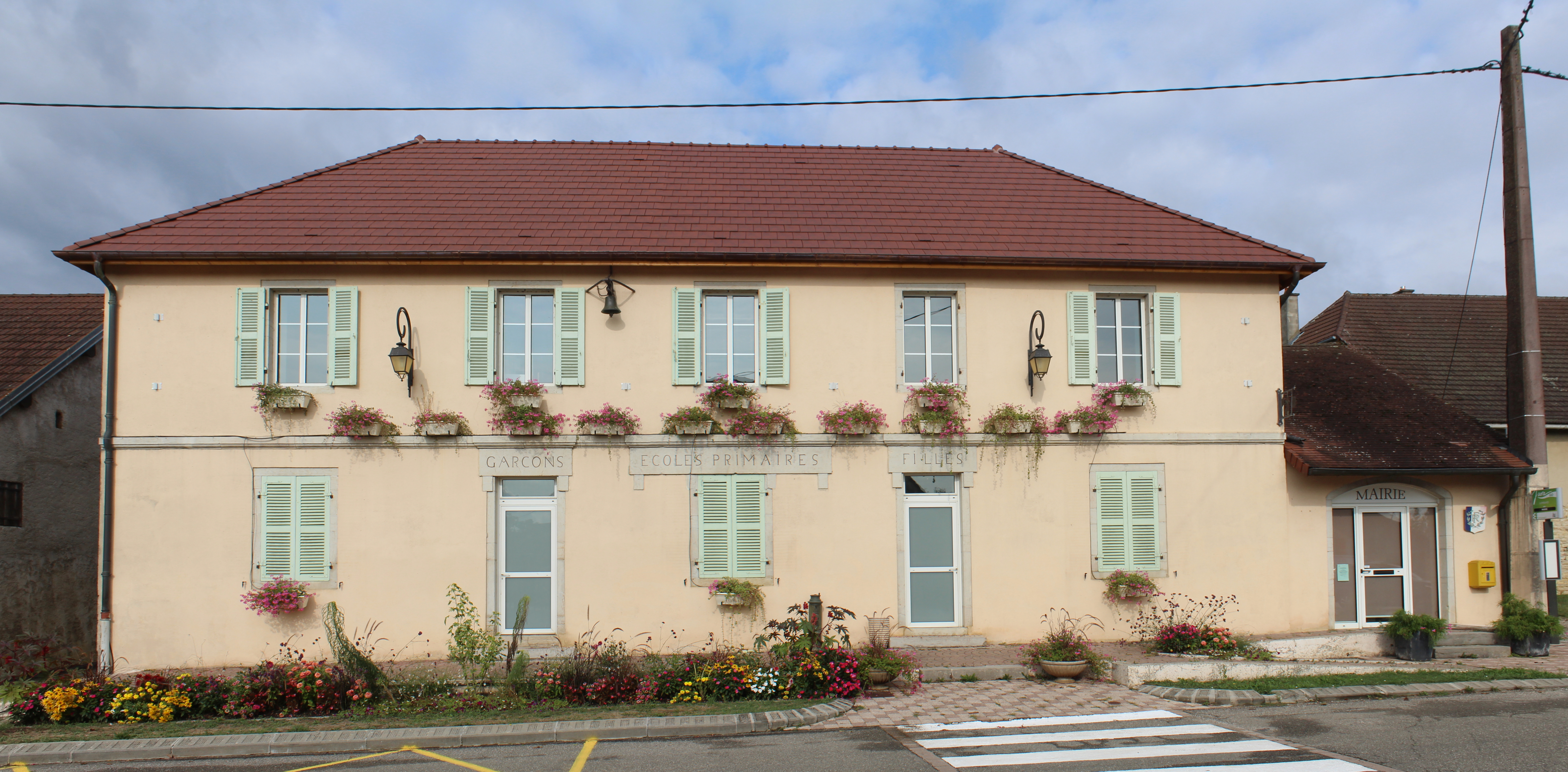 Mairie de Lombard, Jura.